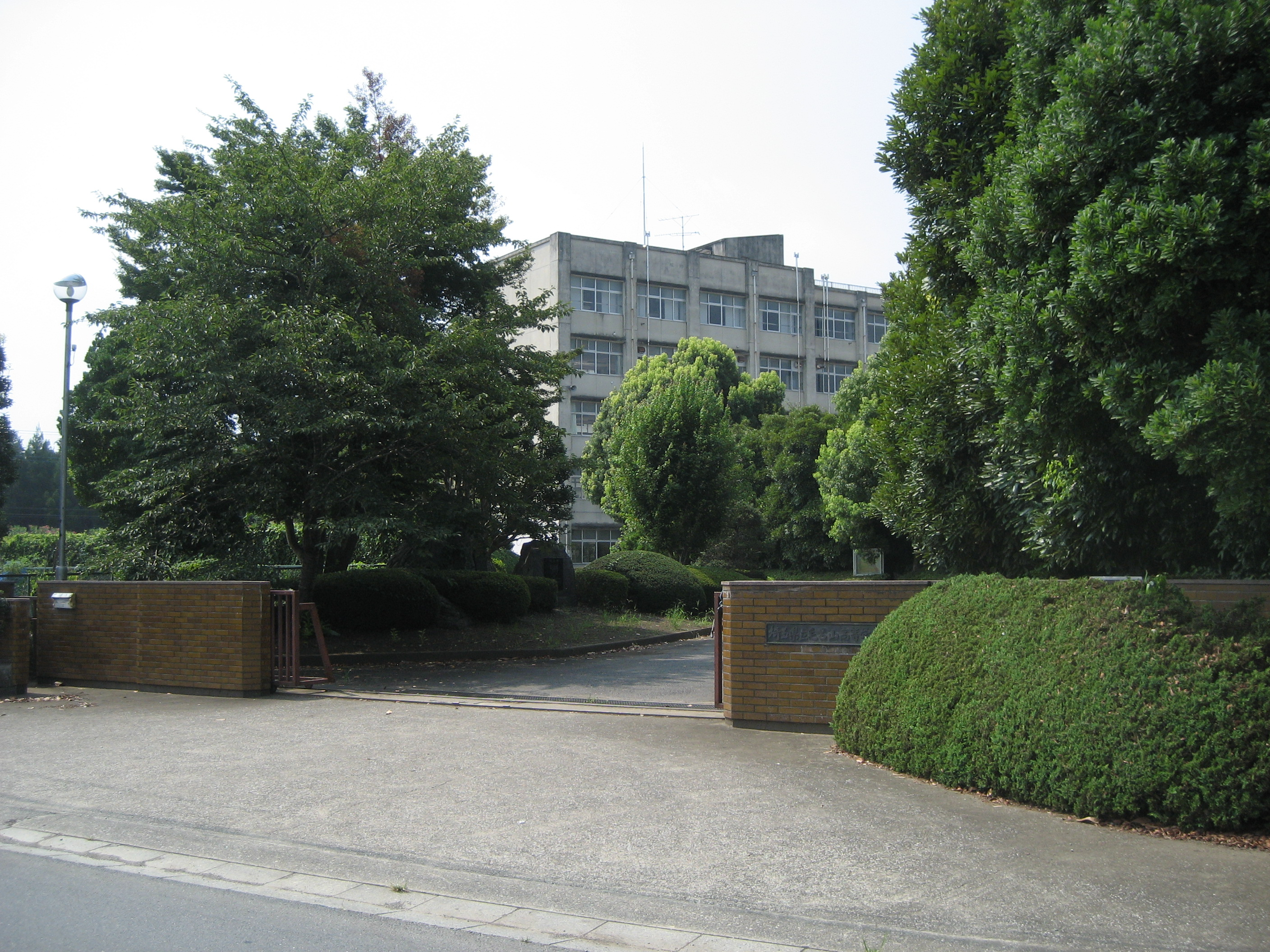 埼玉県立毛呂山高等学校（正門付近を撮影）